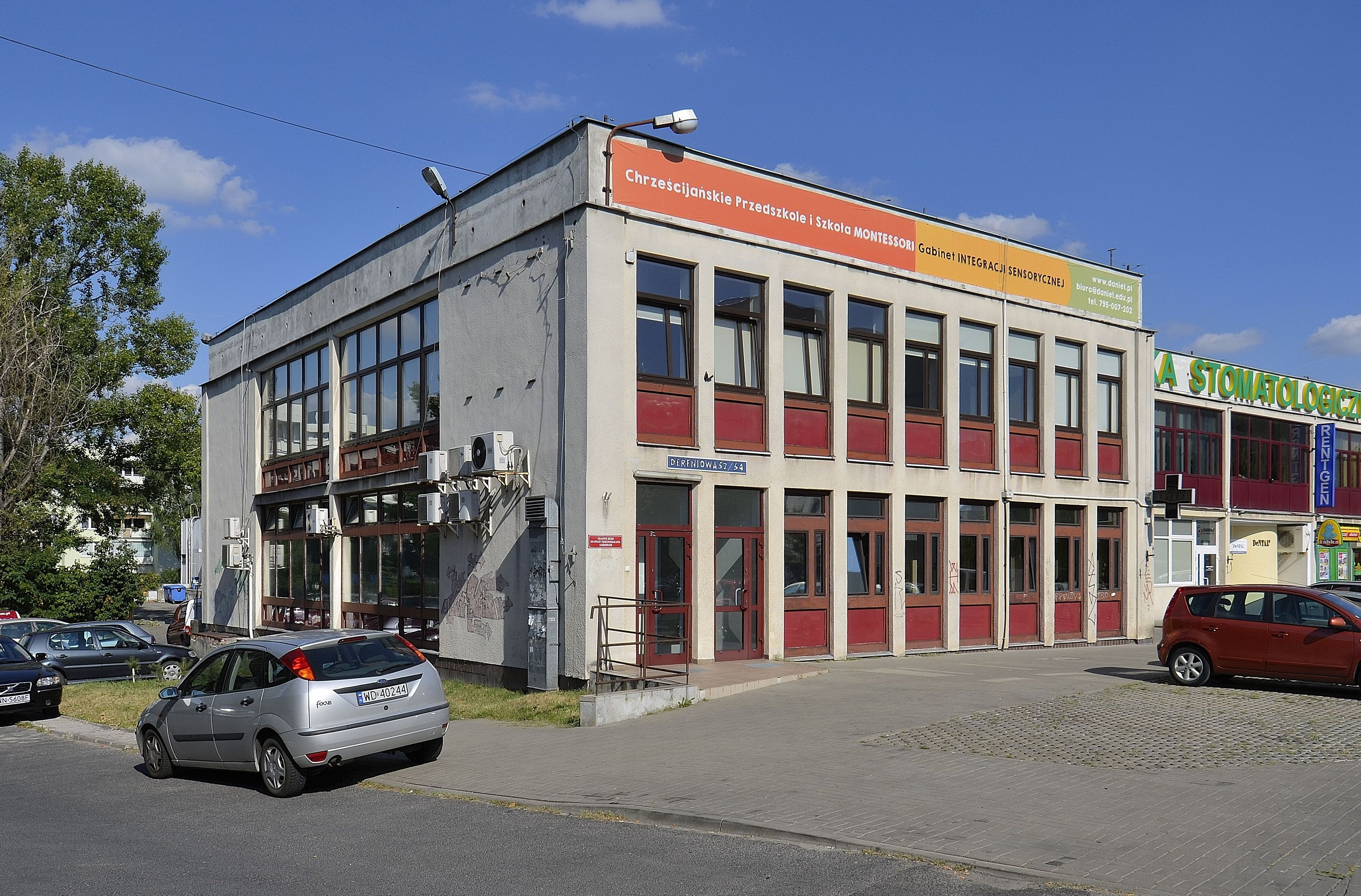 rajowe Biuro Do Spraw Przeciwdziałania Narkomanii przy ul. Dereniowej 52/54